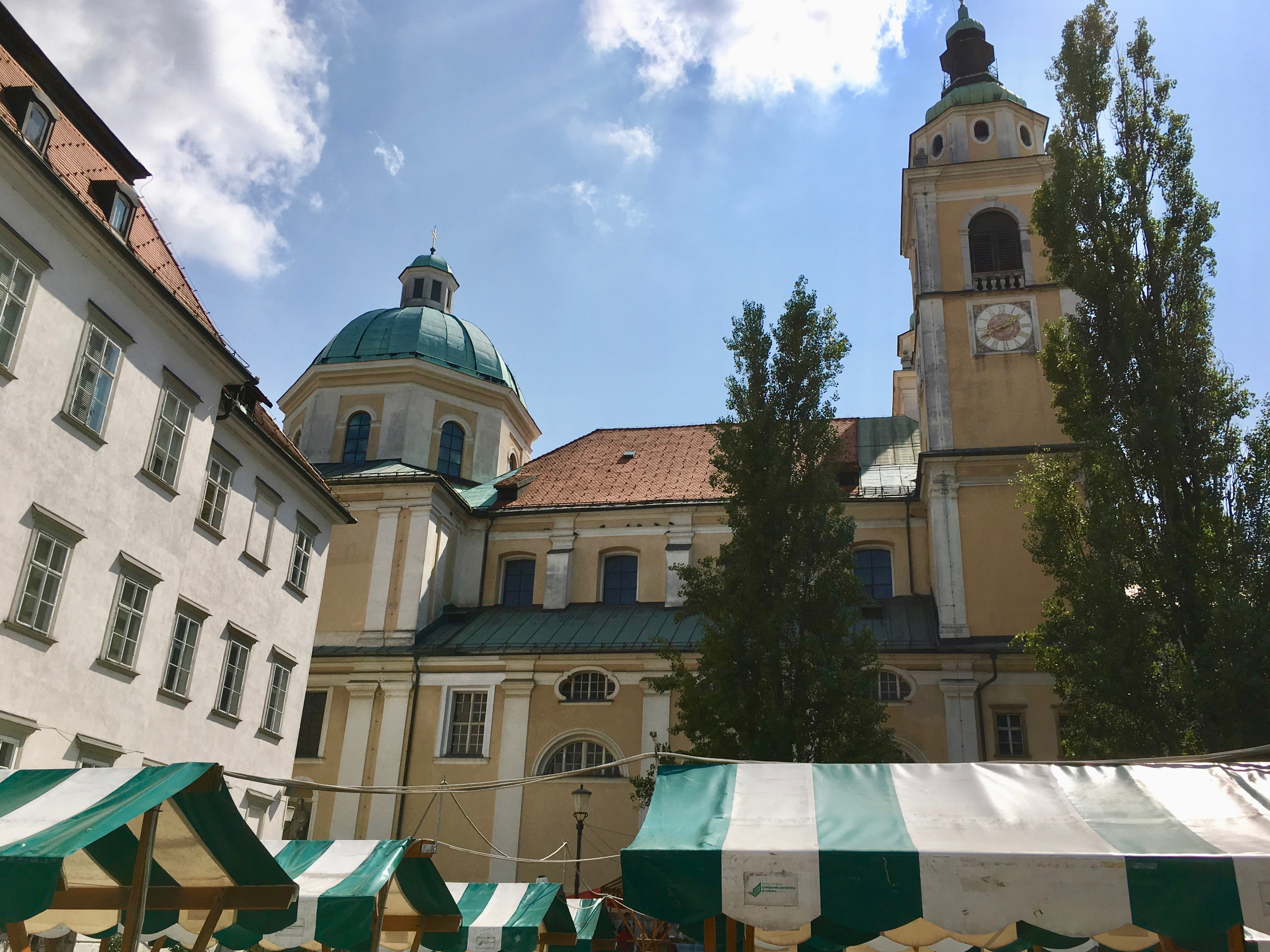 La cathédrale Saint-Nicolas (Stolnica svetega Nikolaja) de style Baroque, remplace au XVIIIème siècle, un édifice gothique. Facilement identifiable grâce à son dôme et ses deux campaniles, elle se trouve à proximité du marché central et de l'hôtel de ville de Ljubljana. Le premier bâtiment daterait de 1262, élevé au rang de cathédrale au milieu du XVème siècle avant d'être ravagé par un incendie. L'église actuelle est un chef-d'oeuvre baroque. Réplique de l'église du Gesù de Rome, ses fresques, la magnificence de son autel et les dorures de ses orgues ne manquent pas d'éblouir.